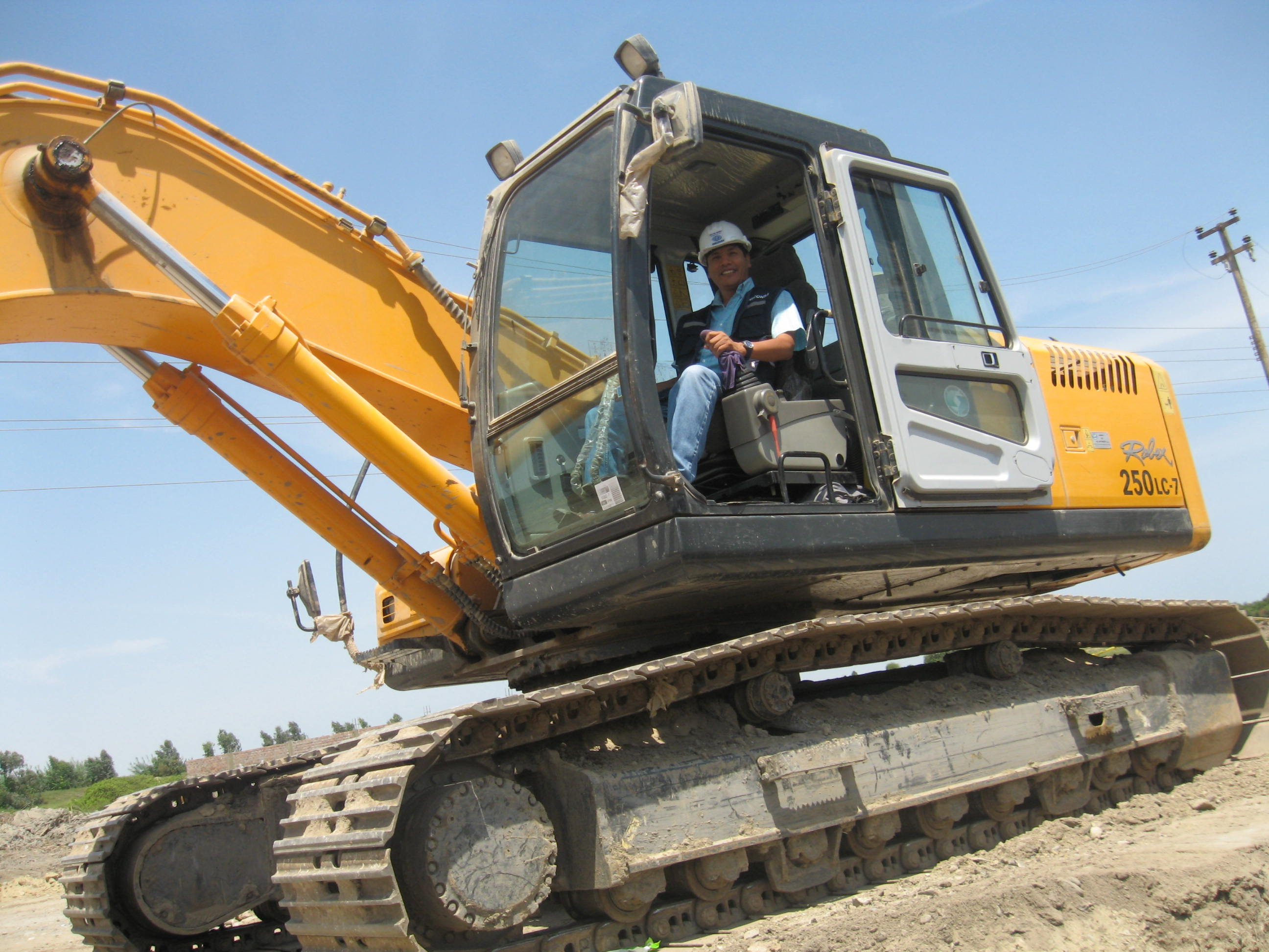 Walter Ibañez manejando una Excavadora